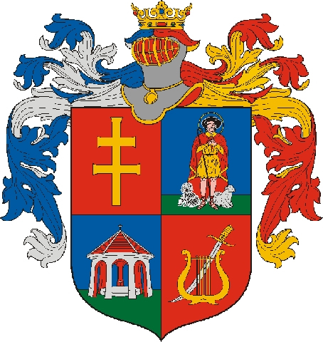 Coat of arms of PetőfiszállásPetőfiszállás, Hungary